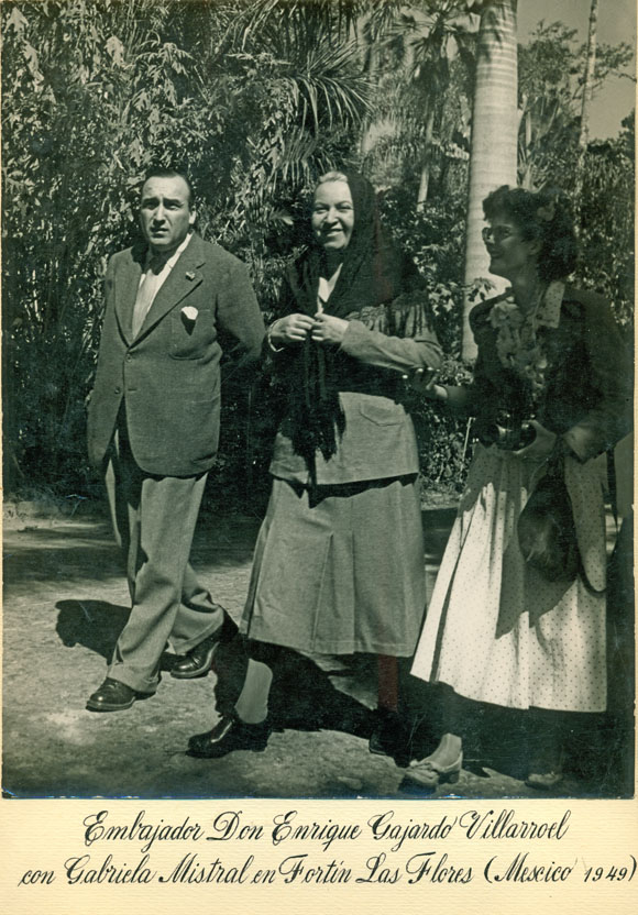 "Embajador Don Enrique Gajardo Villaroel con Gabriela Mistral. Fortín Las Flores. México. 1949" Retratados: Gajardo Villaroel, Enrique. Embajador de Chile en México/ Mistral, Gabriela. Poetisa chilena/ Dana, Doris.